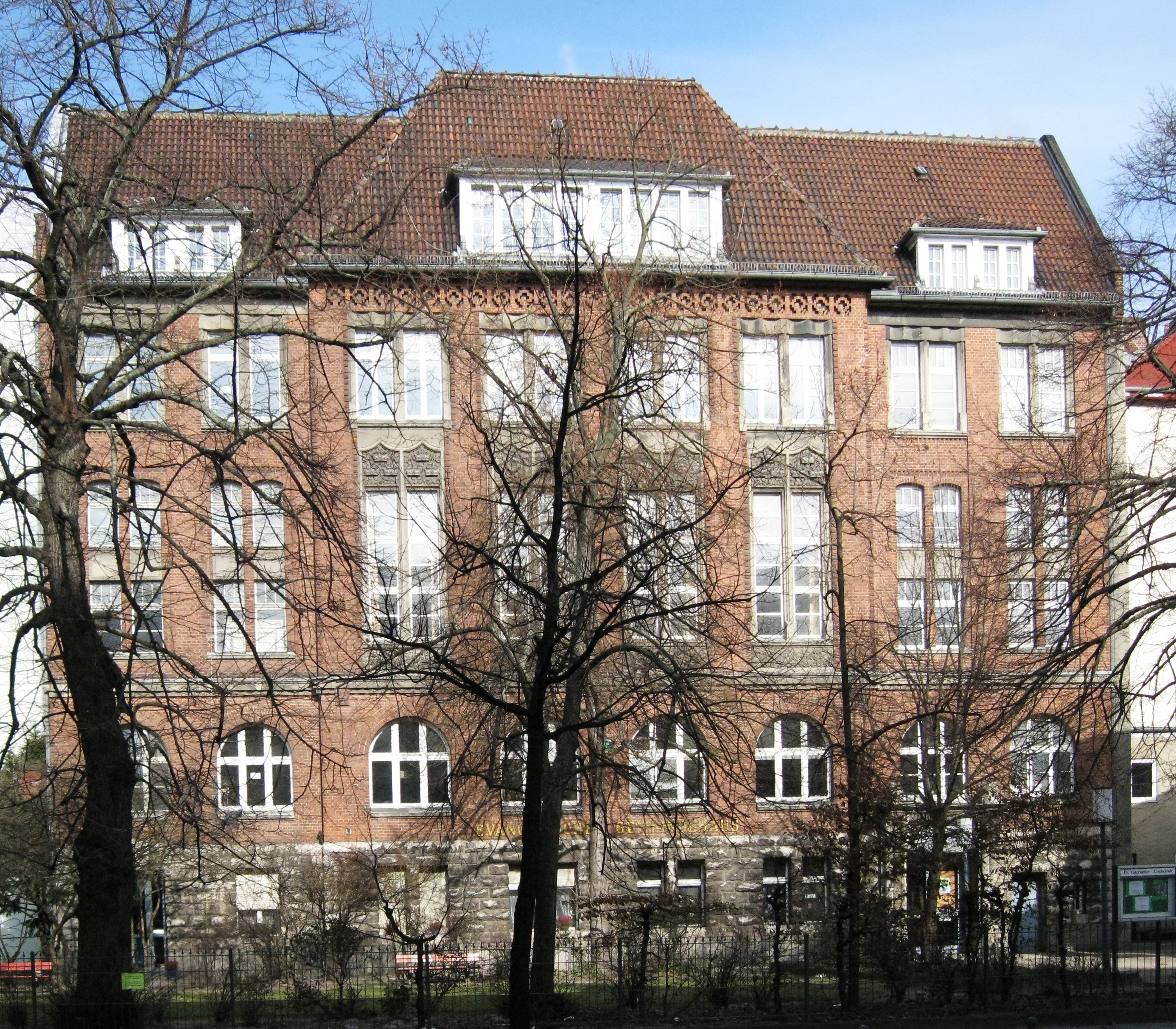 Gemeindehaus der Vaterunser-Gemeinde